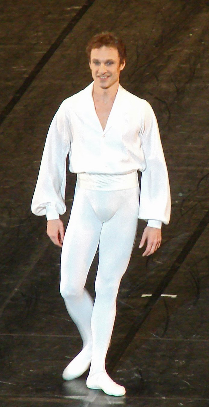 Manuel Legris, danseur étoile, lors du défilé du corps de ballet de l'Opéra de Paris, pour la soirée de ses adieux.